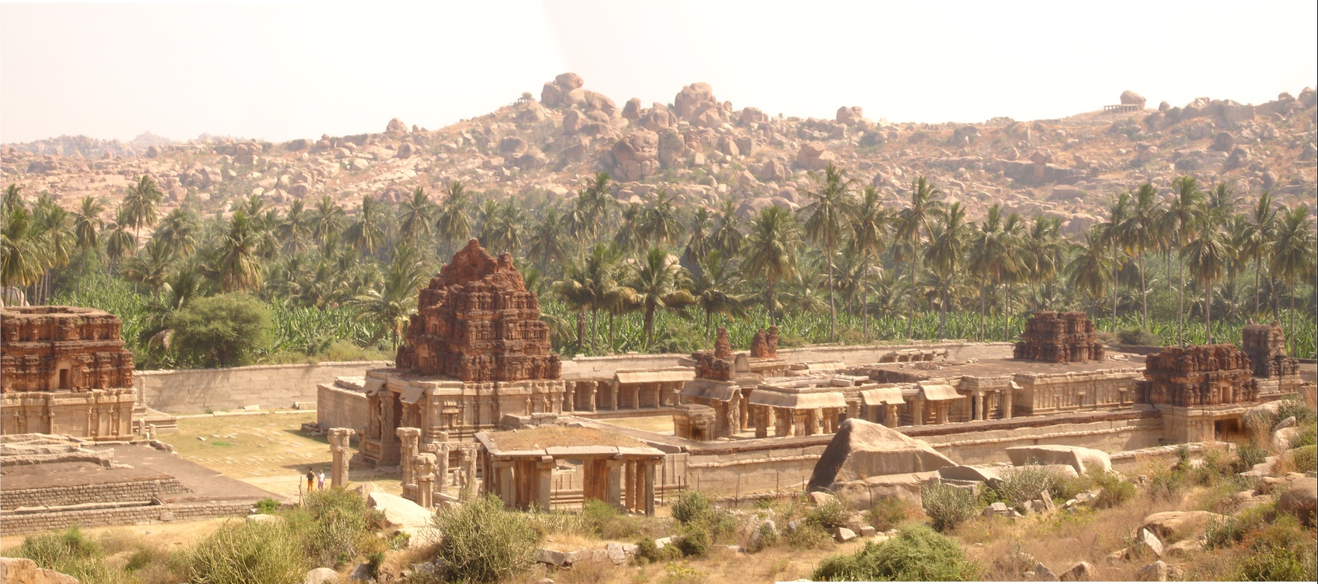 Hampi.in Achuta Raya Temple